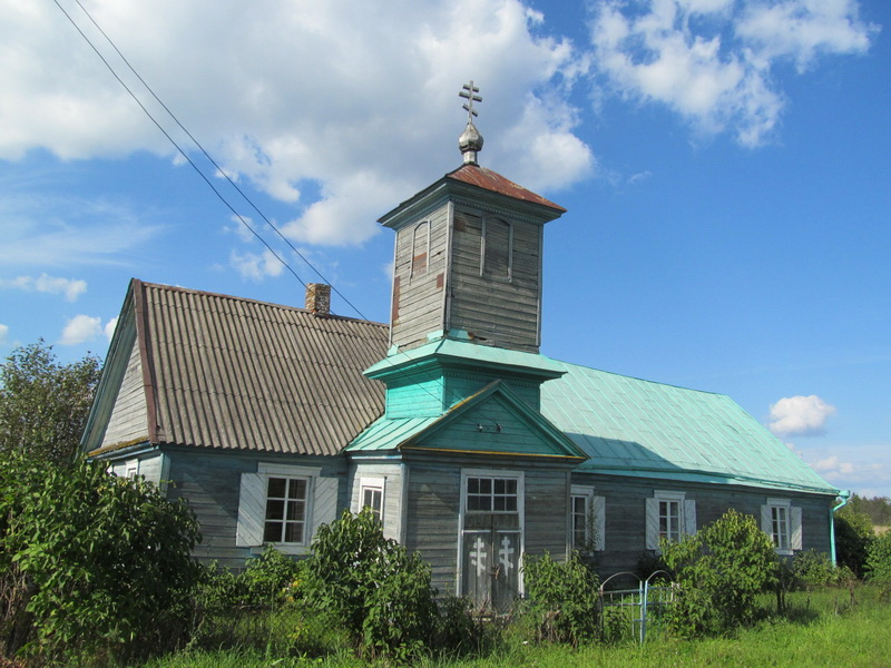 Булавішкі. Свята-Пакроўская стараверская царква